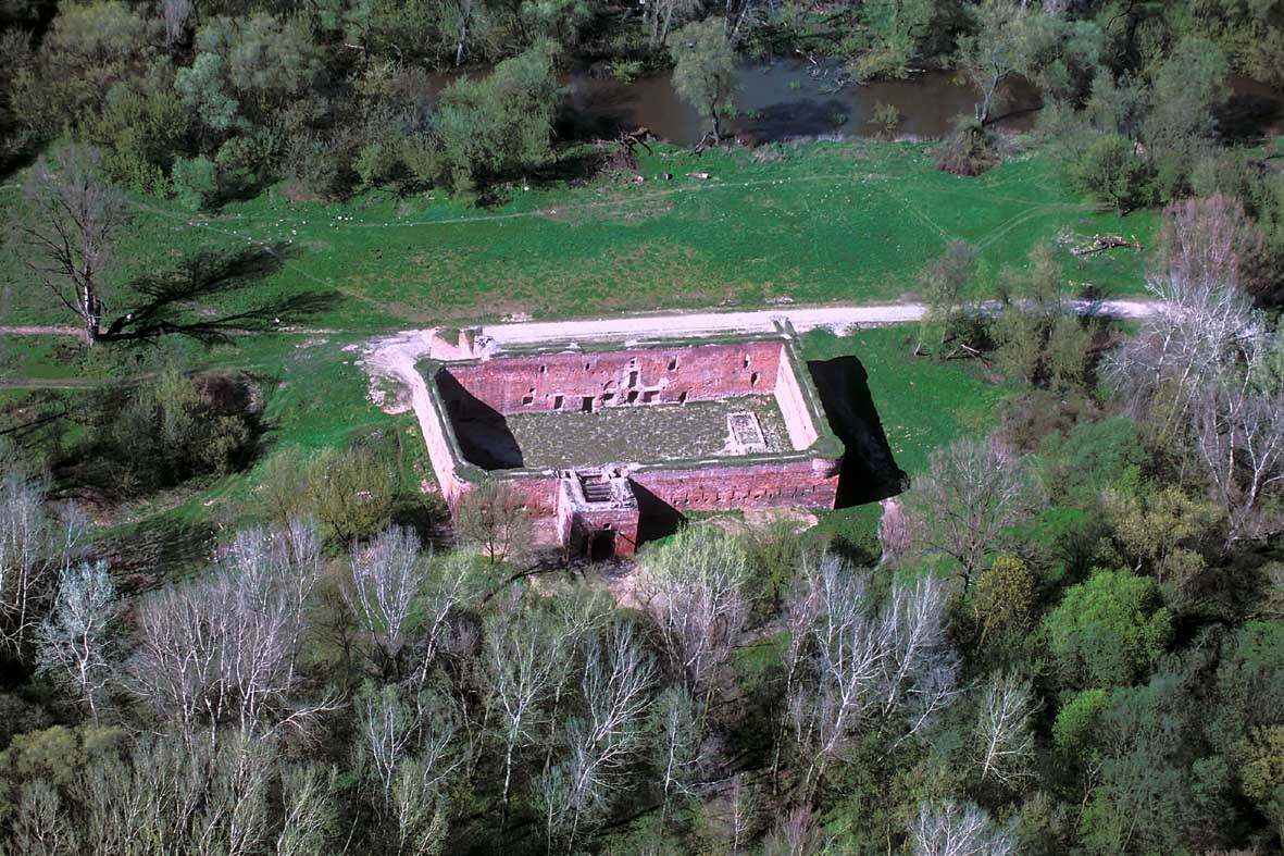 Zamek Dybowski w Toruniu (dawniej "Nieszawa"), na którym nadano przywileje "złotej wolności szlacheckiej"